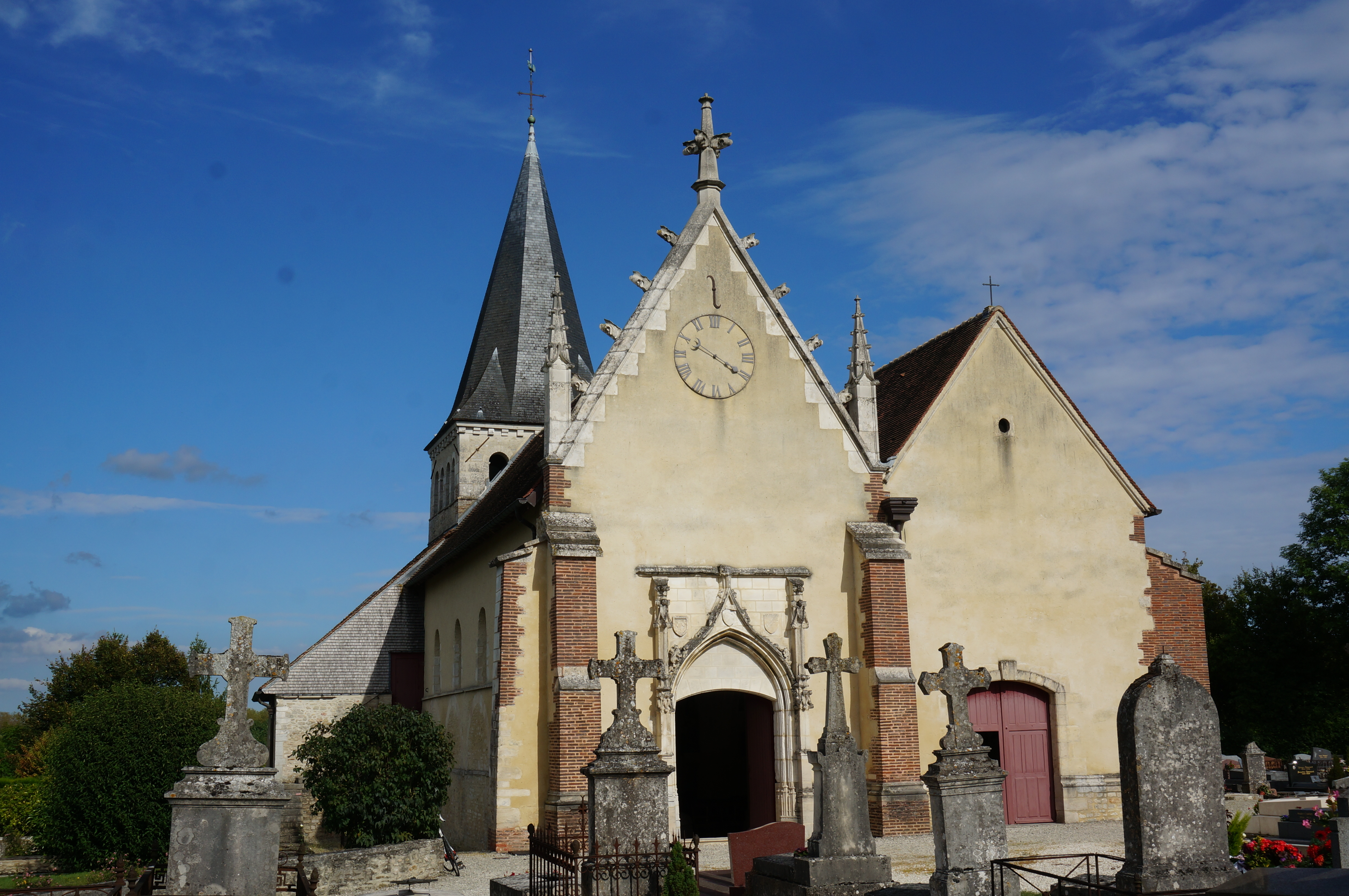 Église Saint-Pierre et nécropoles .